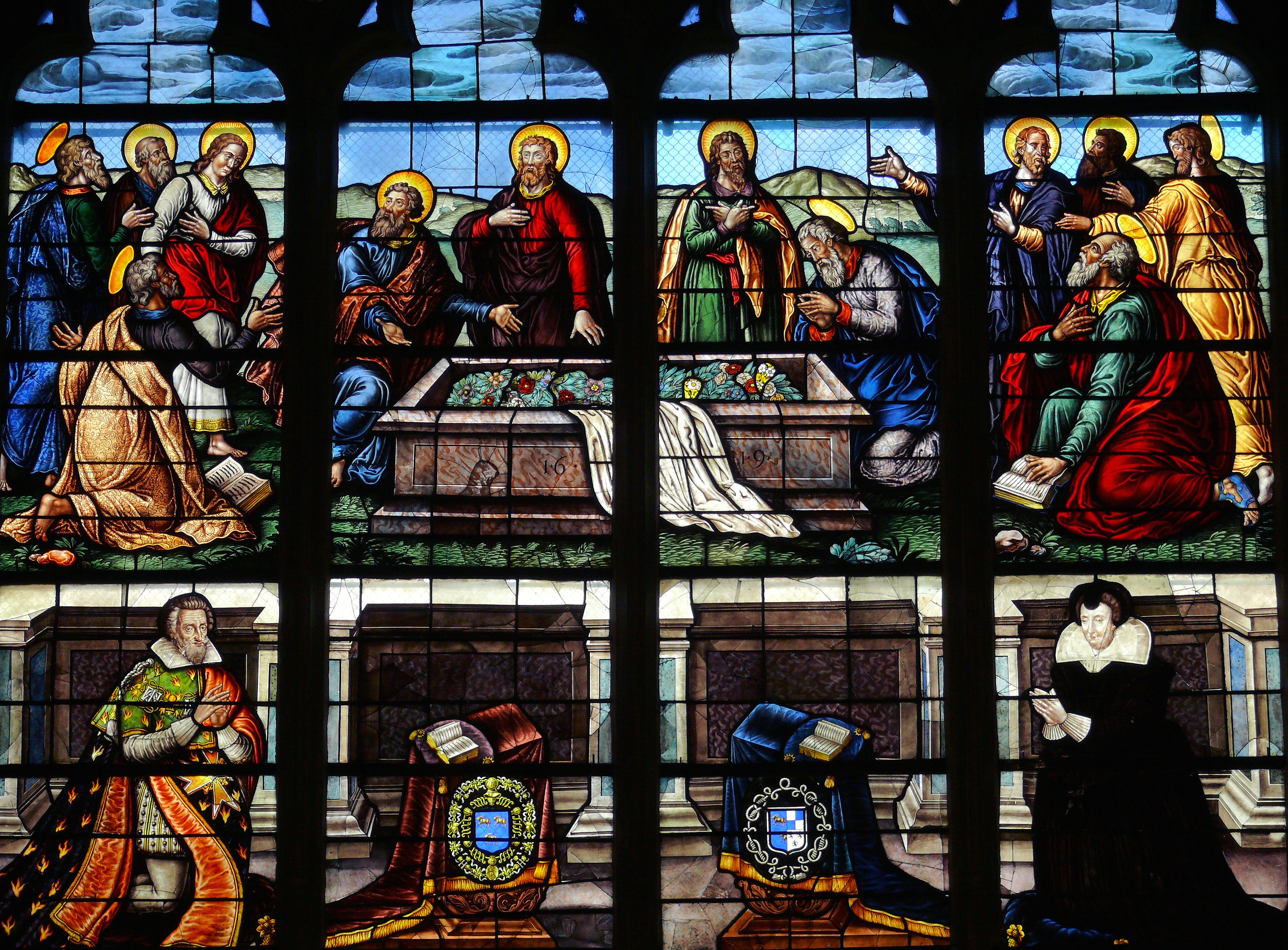 Bourges - Cathédrale - Chapelle des fonts baptismaux - Vitrail de l'Assomption de la Vierge